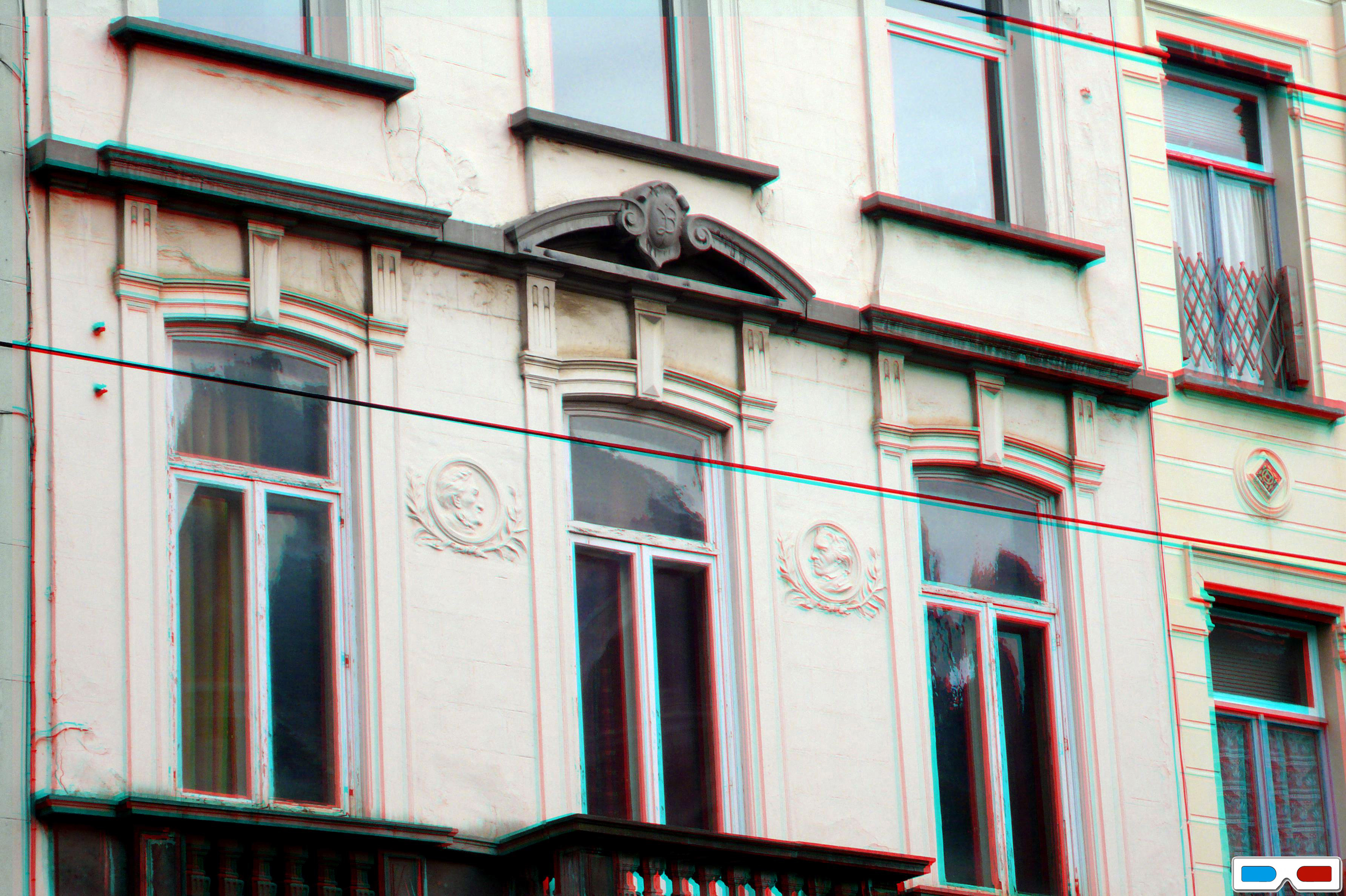 Maison d'Eugène Ysaye à Forest, 48 avenue Brugmann. Vue de la façade au premier étage. Image 3D View.